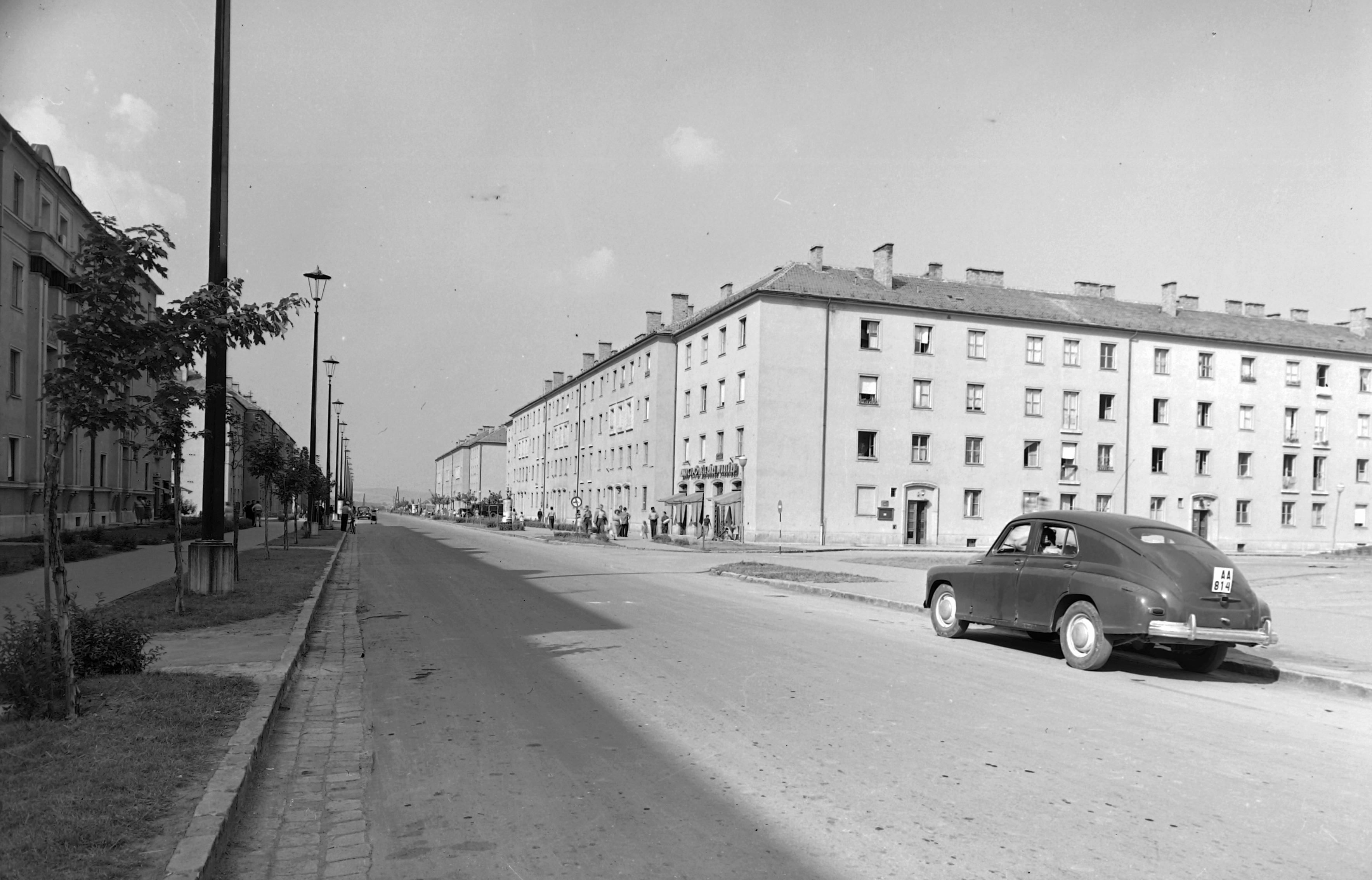 Egressy Béni (Lenin) út a Szabadság térről nézve. Location: Hungary Tags: automobile, number plate, Soviet brand, street view, cityscape, socialist realism, GAZ-brand, M20 Pobieda Title: Egressy Béni (Lenin) út a Szabadság térről nézve.